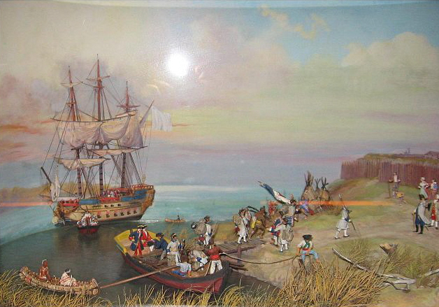 Fort de Pointe-aux-Trembles